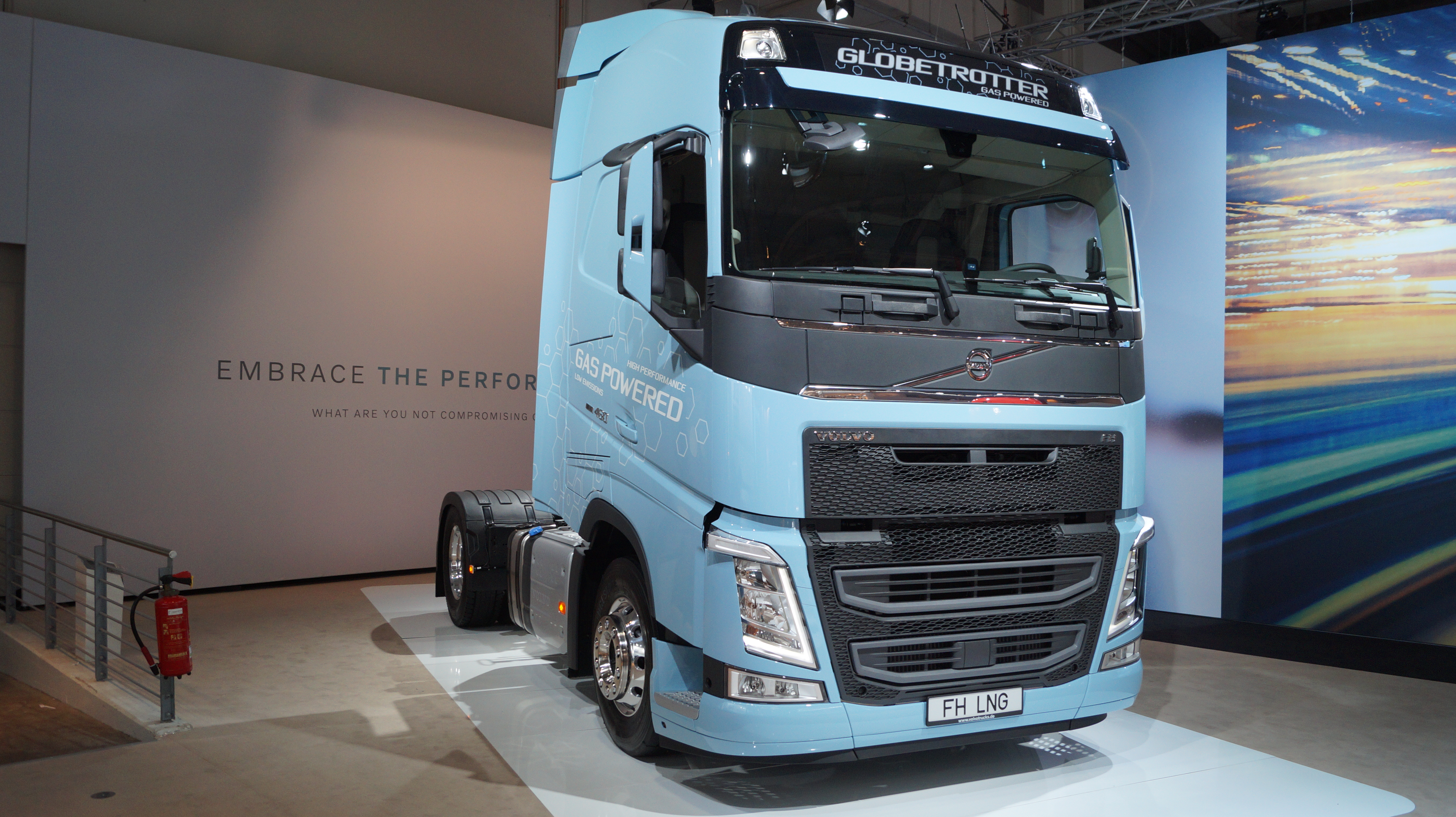 Schrägansicht der Front eines Volvo FH460 LNG, ausgestellt auf der IAA 2018.